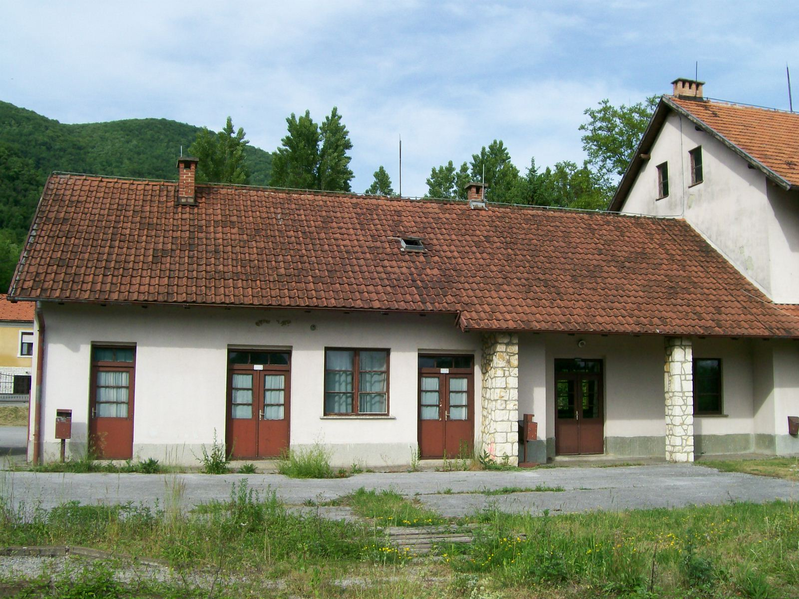 Željeznički kolodovor u Klanjcu